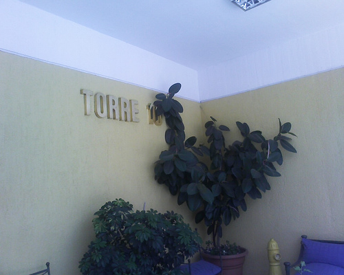 La Torre 10 de la Remodelación San Borja, ubicada en la calle Diagonal Paraguay en Santiago de Chile. Sirvió como locación para la teleserie La torre 10 en 1984.